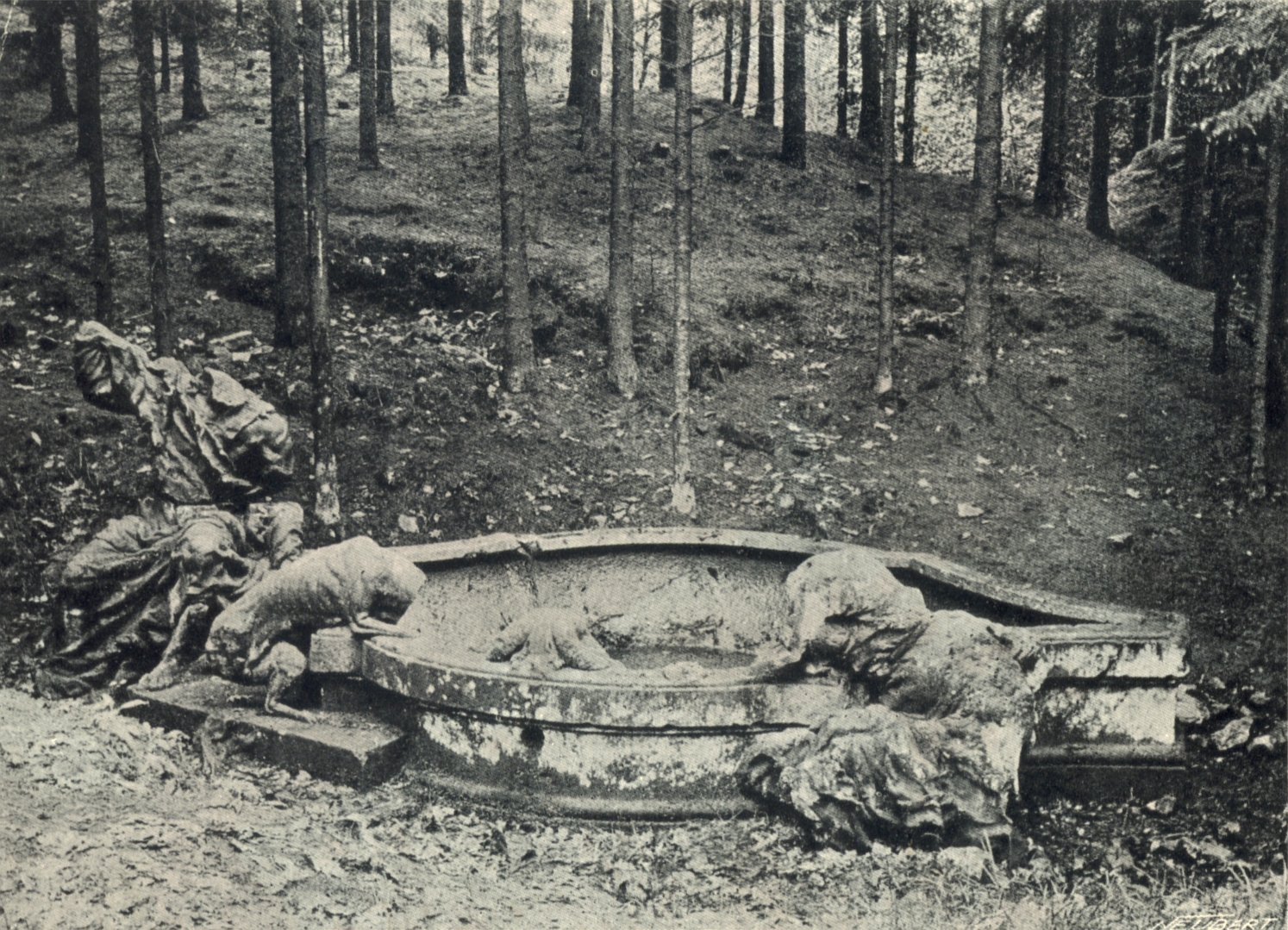 Studna Jákobova v Novém lese u Kuksu, Matyáš Bernard Braun 1726-1729, historická pohlednice z doby před rokem 1907